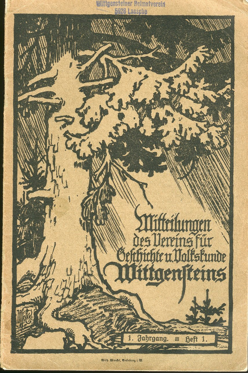 Titelseite der Mitteilungen des Verein für Geschichte und Volkskunde Wittgensteins von 1913, Heft 1